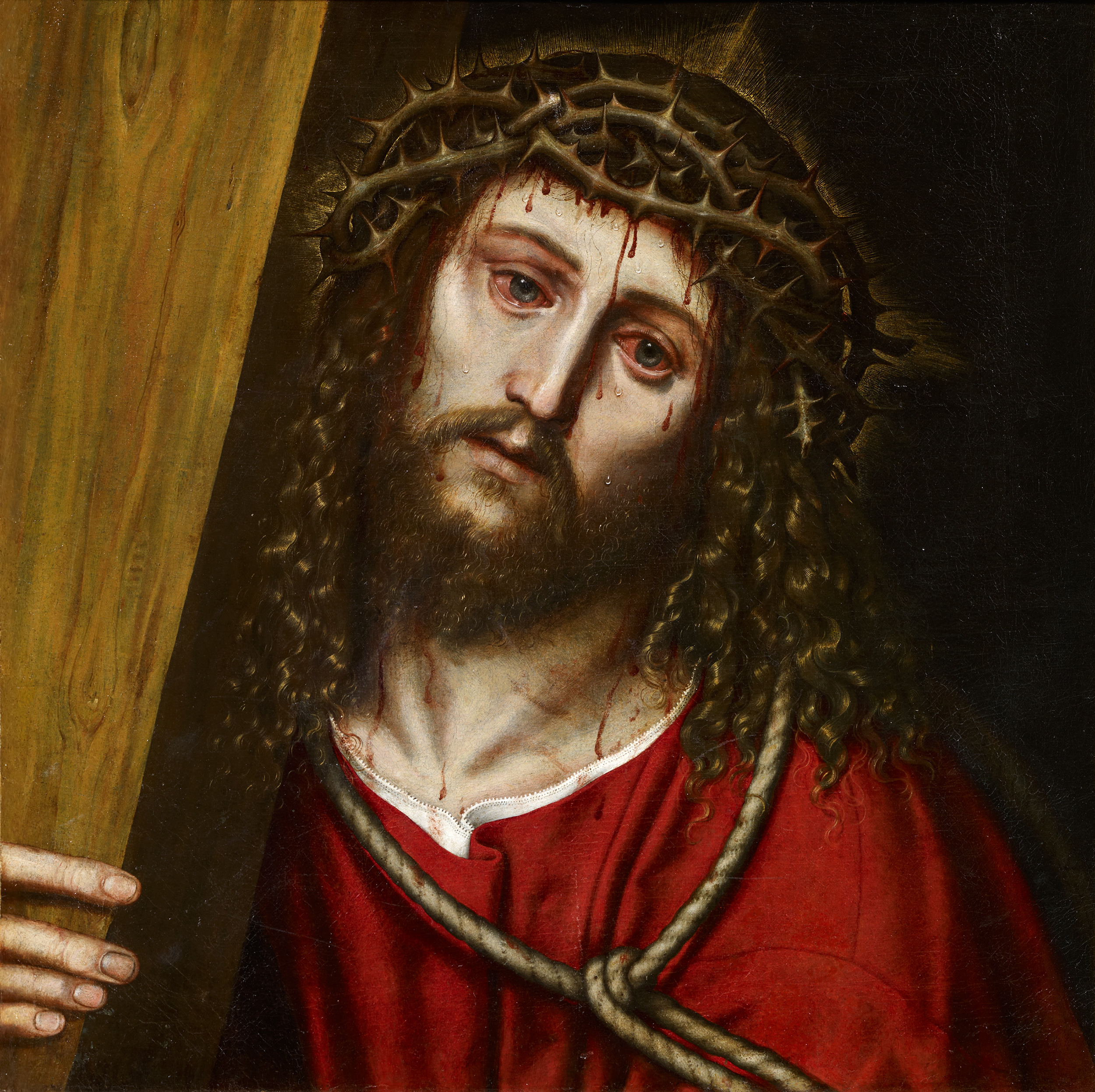 Penitent.